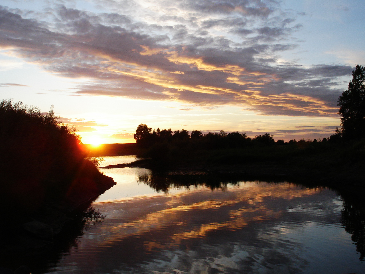 [Безымянный]